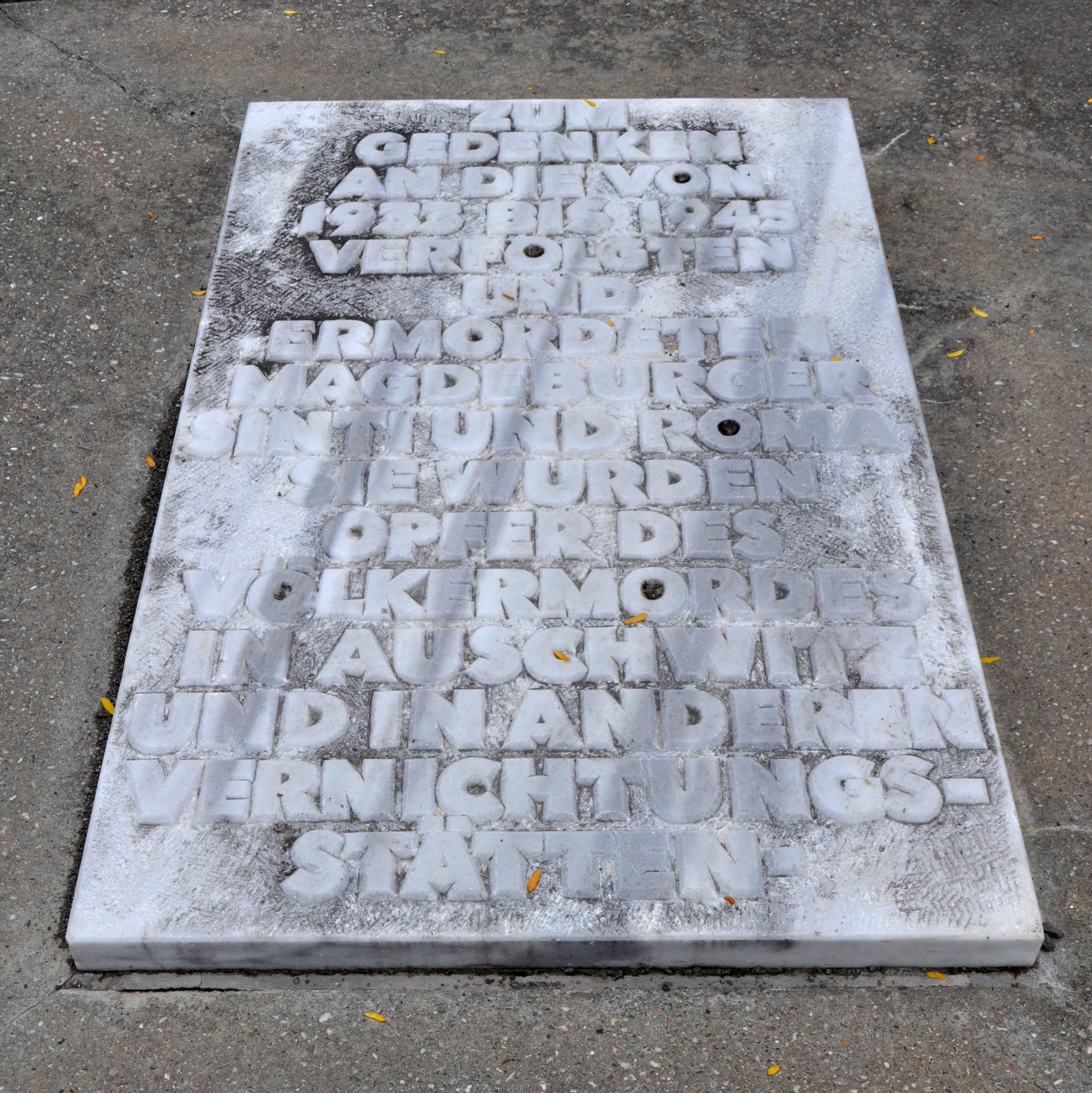 Gedenkstätte für die von 1933 bis 1945 verfolgten Magdeburger Sinti und Roma am Fürstenwallpark in Magdeburg-Altstadt.